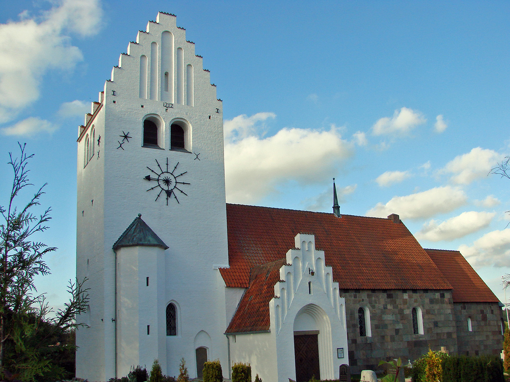 Grønbæk Kirke set fra syd.